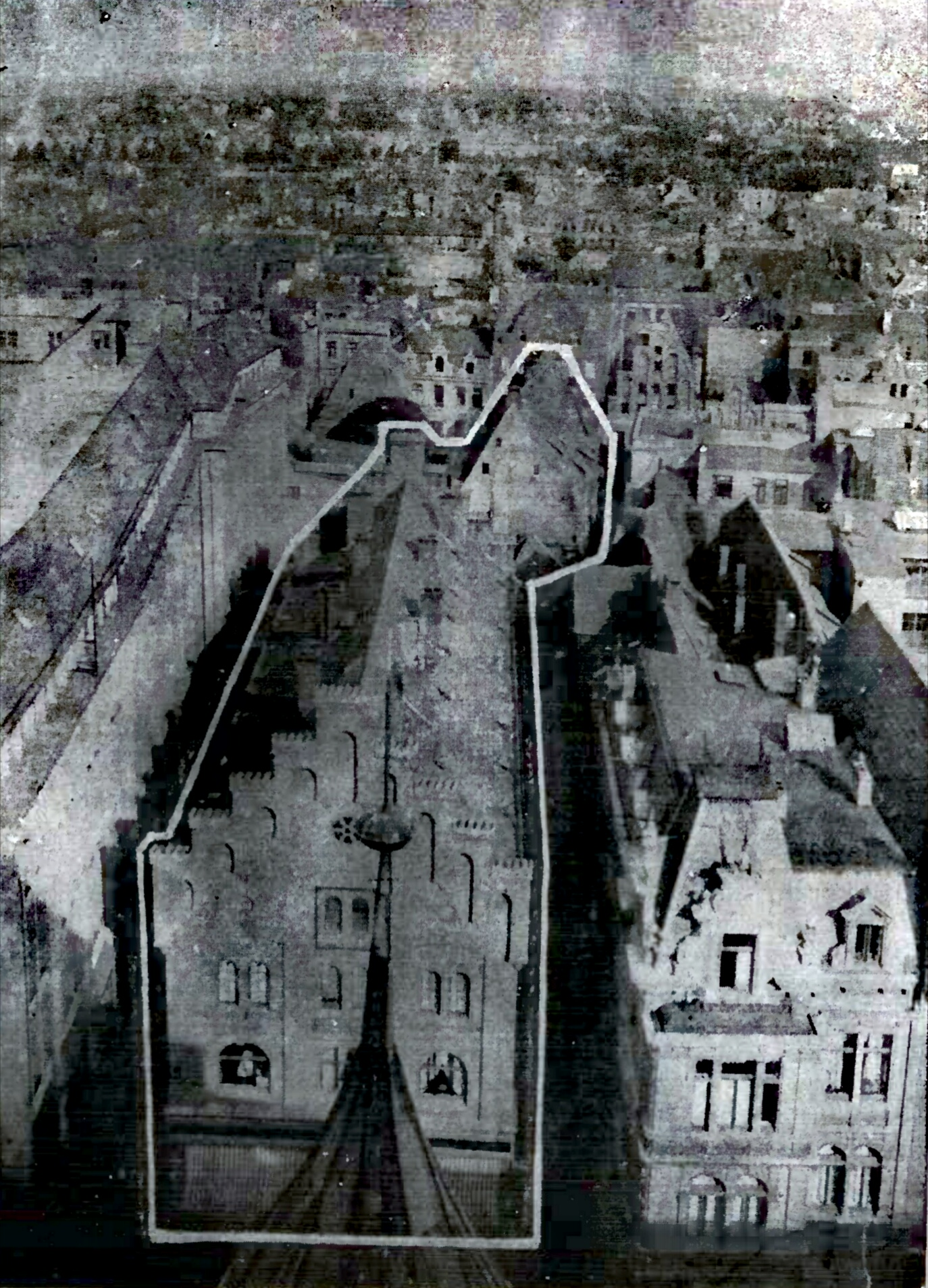 Die mit der Ausführung des Schrangendurchbruchs fallende Häuserreihe.